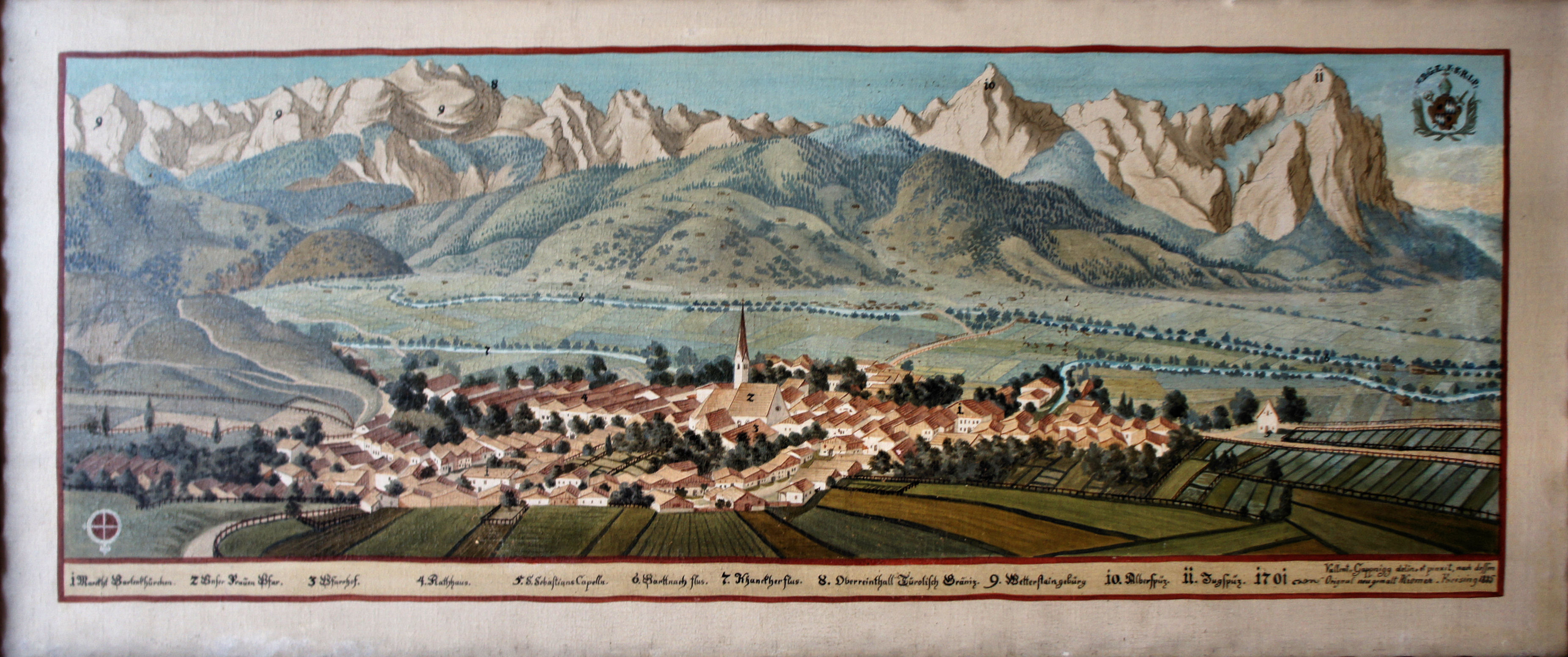 Gemälde aus einer Serie mit Darstellungen von Besitztümern des Hochstifts Freising im Fürstengang zwischen Fürstbischöflicher Residenz und Freisinger Dom.